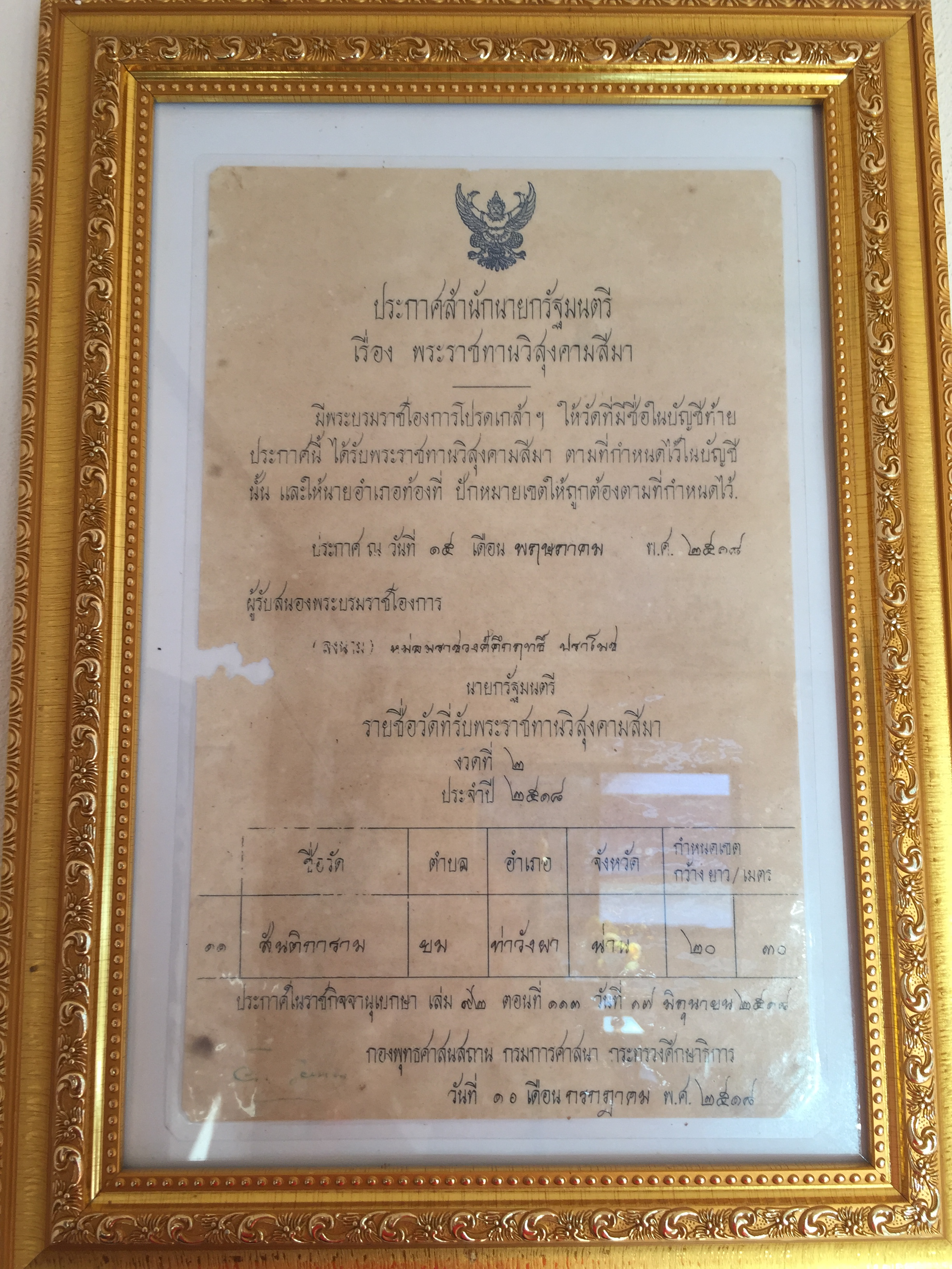 พระราชทานวิสุงคามสีมาวัดสันติการาม